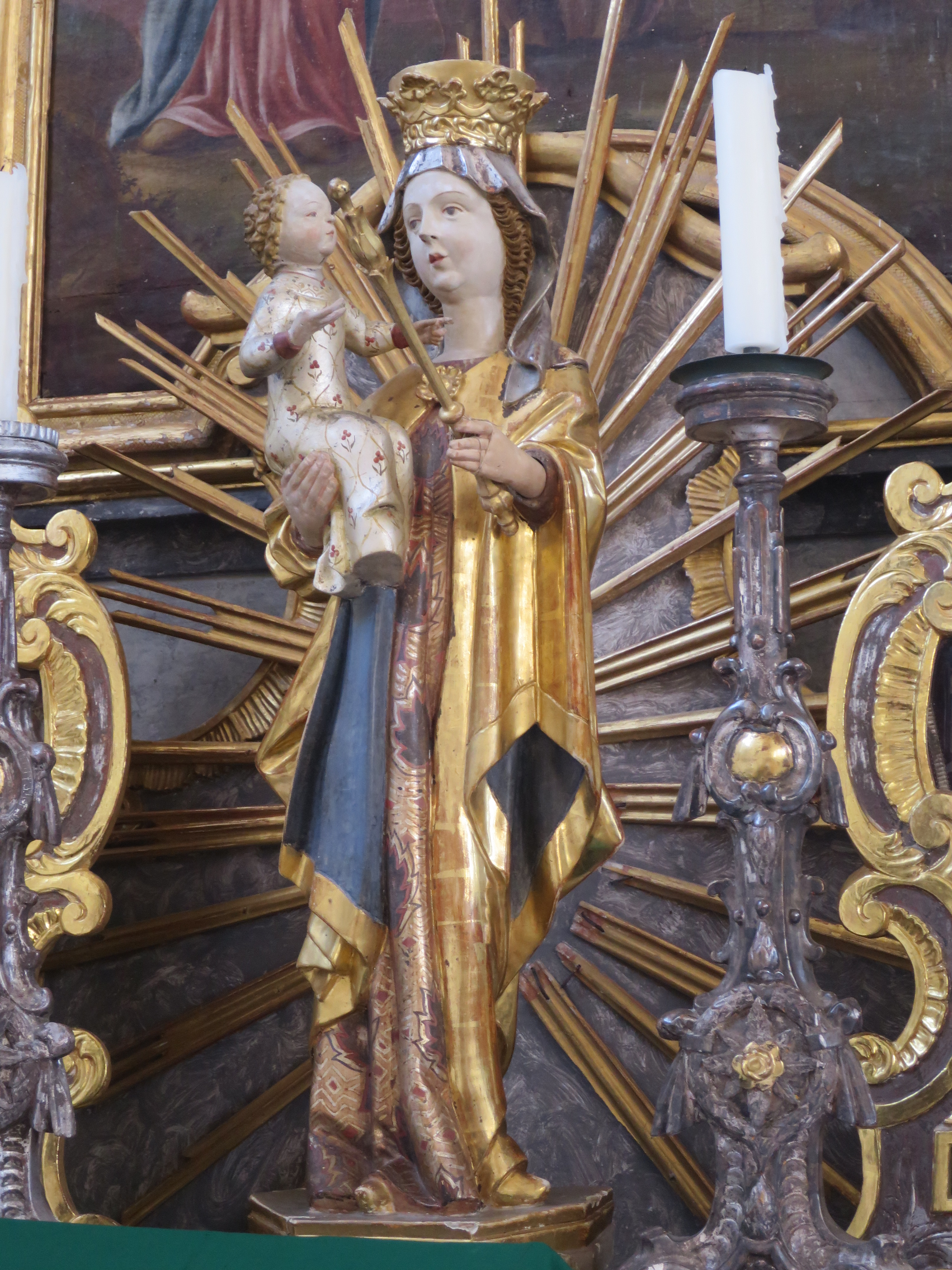 Muttergottes am linken Seitenaltar, 15.JH.